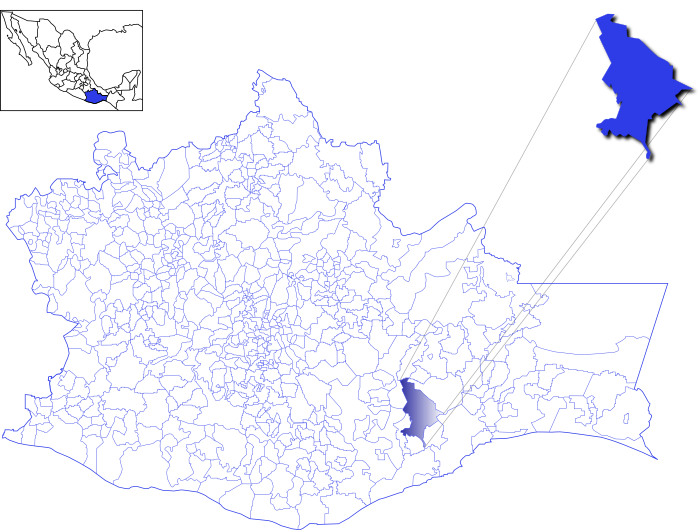 Mapa del municipio de Magdalena Tequisistlàn, Oaxaca, Mèxico.